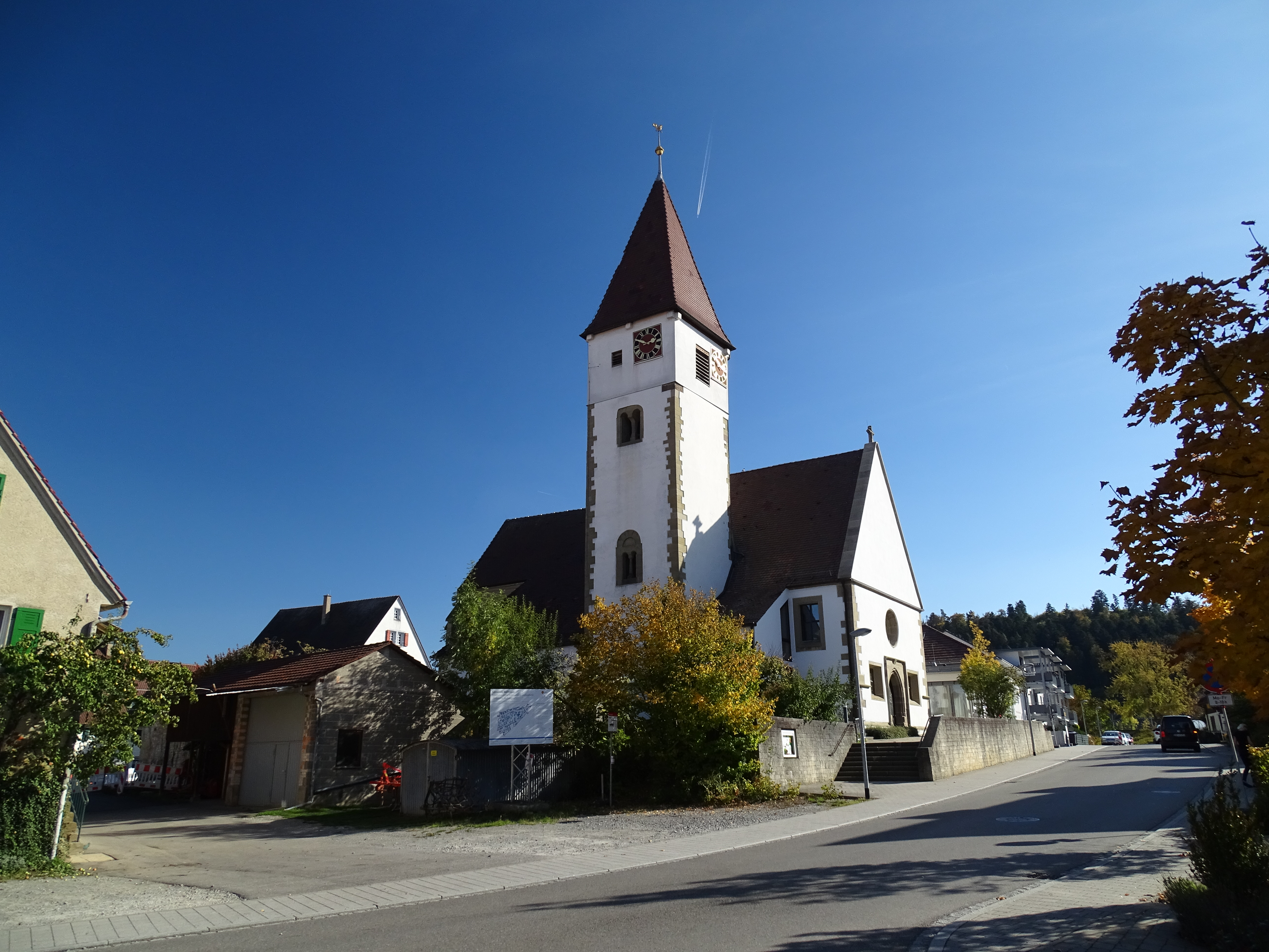 Evangelische Pelagiuskirche Nufringen